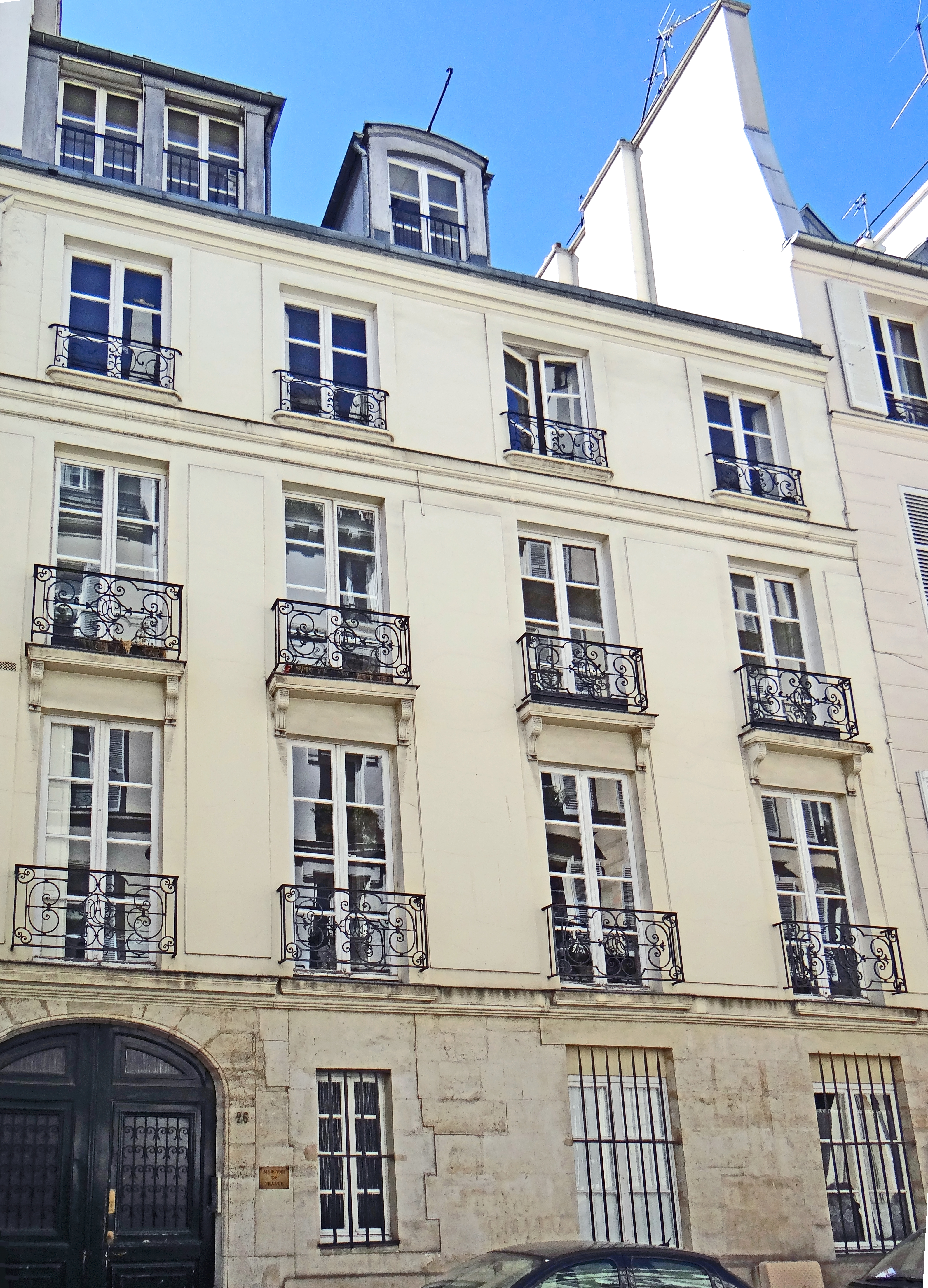 Paris - Hôtel Charles-Testu, 26 rue de Condé Ancien hôtel de Beaumarchais qui y réside de 1763 à 1776. Immeuble du Mercure de France, fondé par Alfred Vallette en 1889. Paul Léautaud y eut son bureau au premier étage.